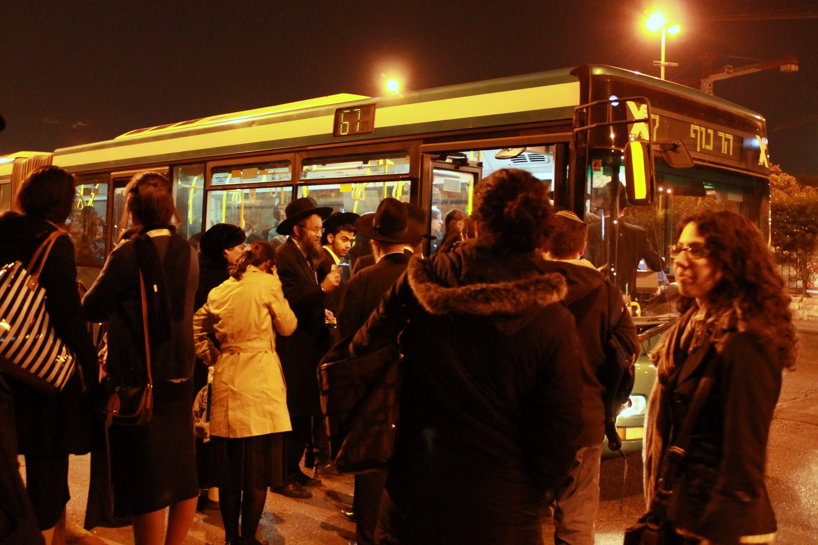 אנשים עולים לקו 67